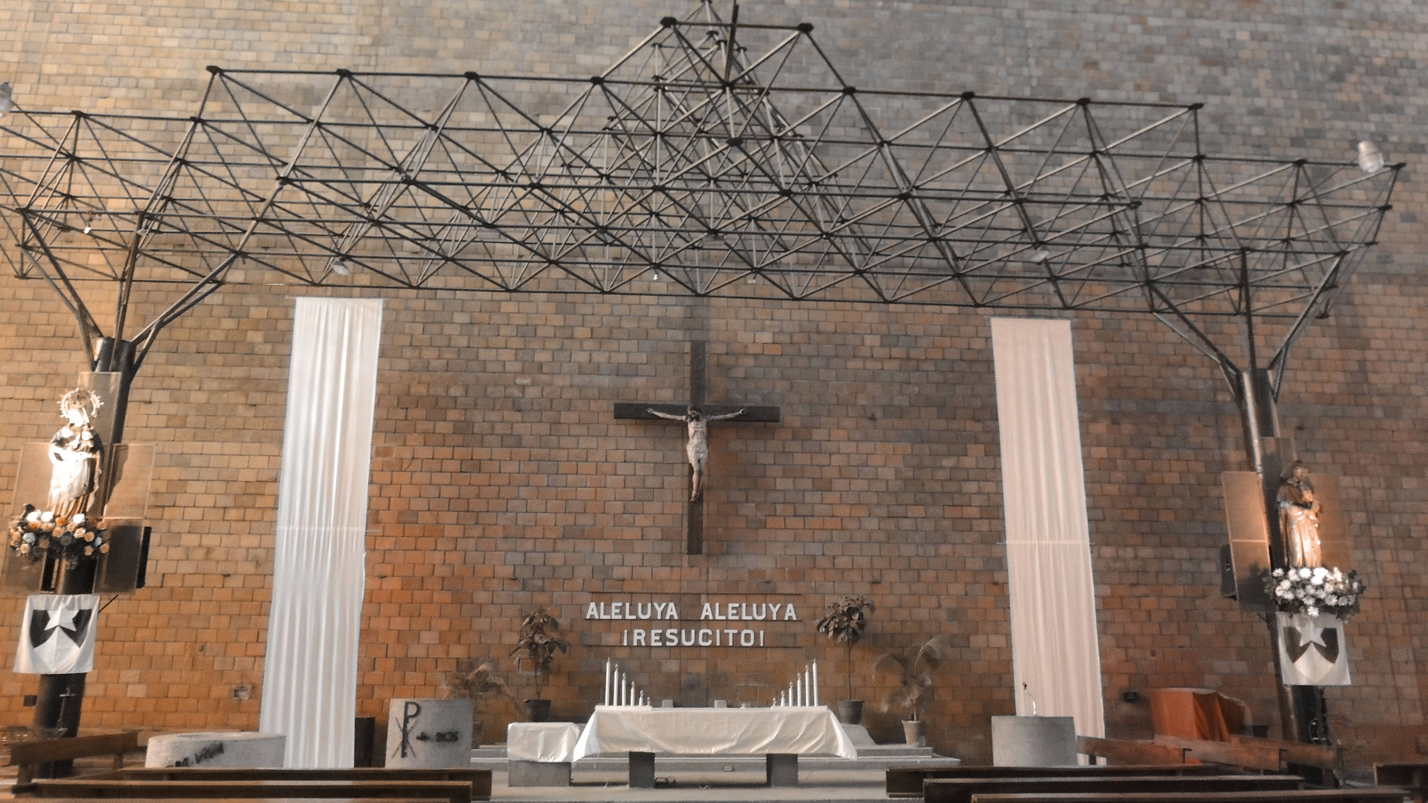 Pulpito de la Iglesia el Rosario